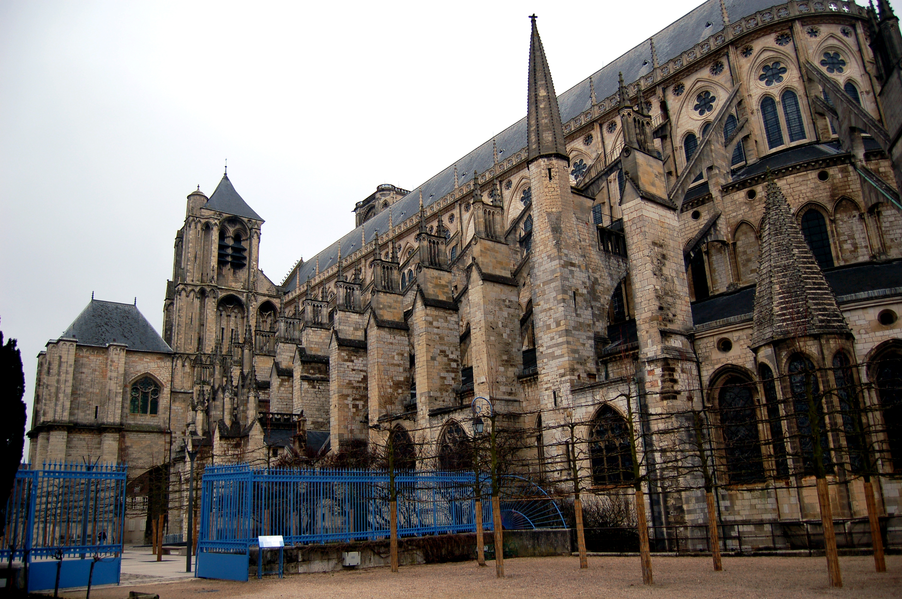 Cathédrale Saint-Étienne de Bourges